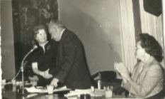 תיאה נתן מקבלת את פרס הנרייטה סאלד בשנת 1965